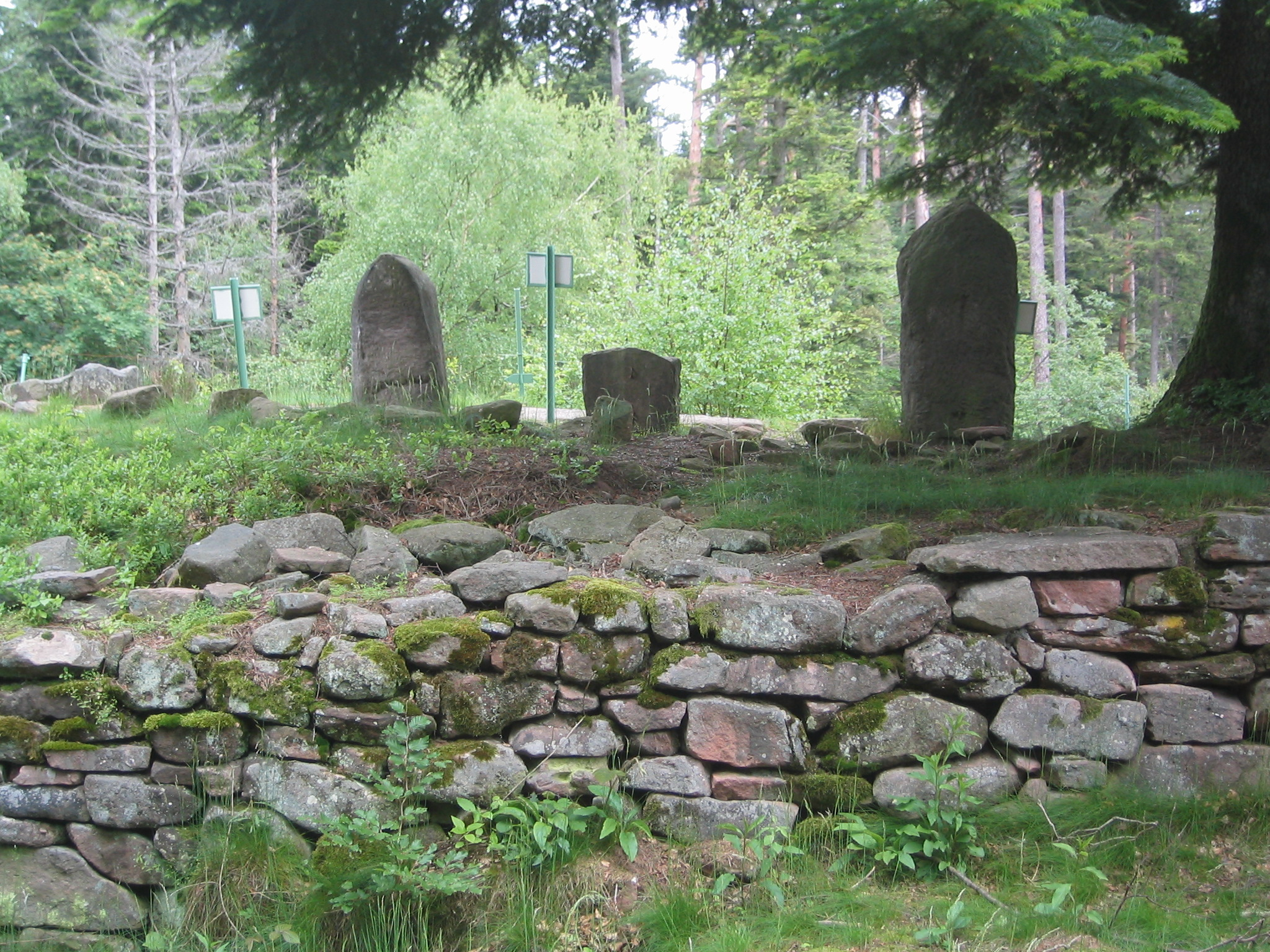 Muraille et stèles funéraires au Camp celtique de la Bure (Saint-Dié-des-Vosges, Vosges, France).